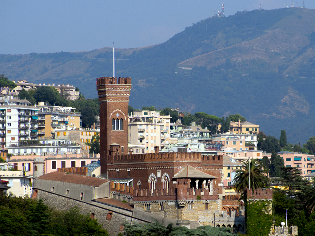 Castello d'Albertis Veduta This is a photo of a monument which is part of cultural heritage of Italy.